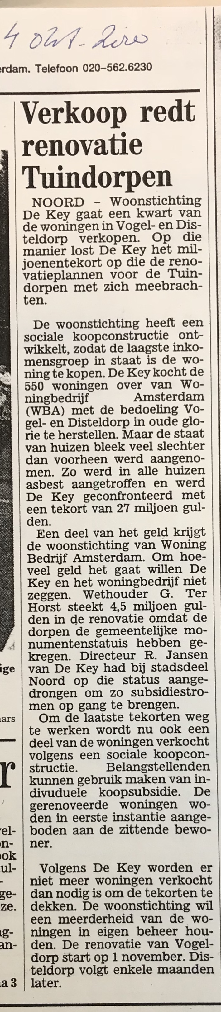 Krantenbericht d.d. 4 oktober 2000 over de verkoop en renovatie van Vogeldorp.